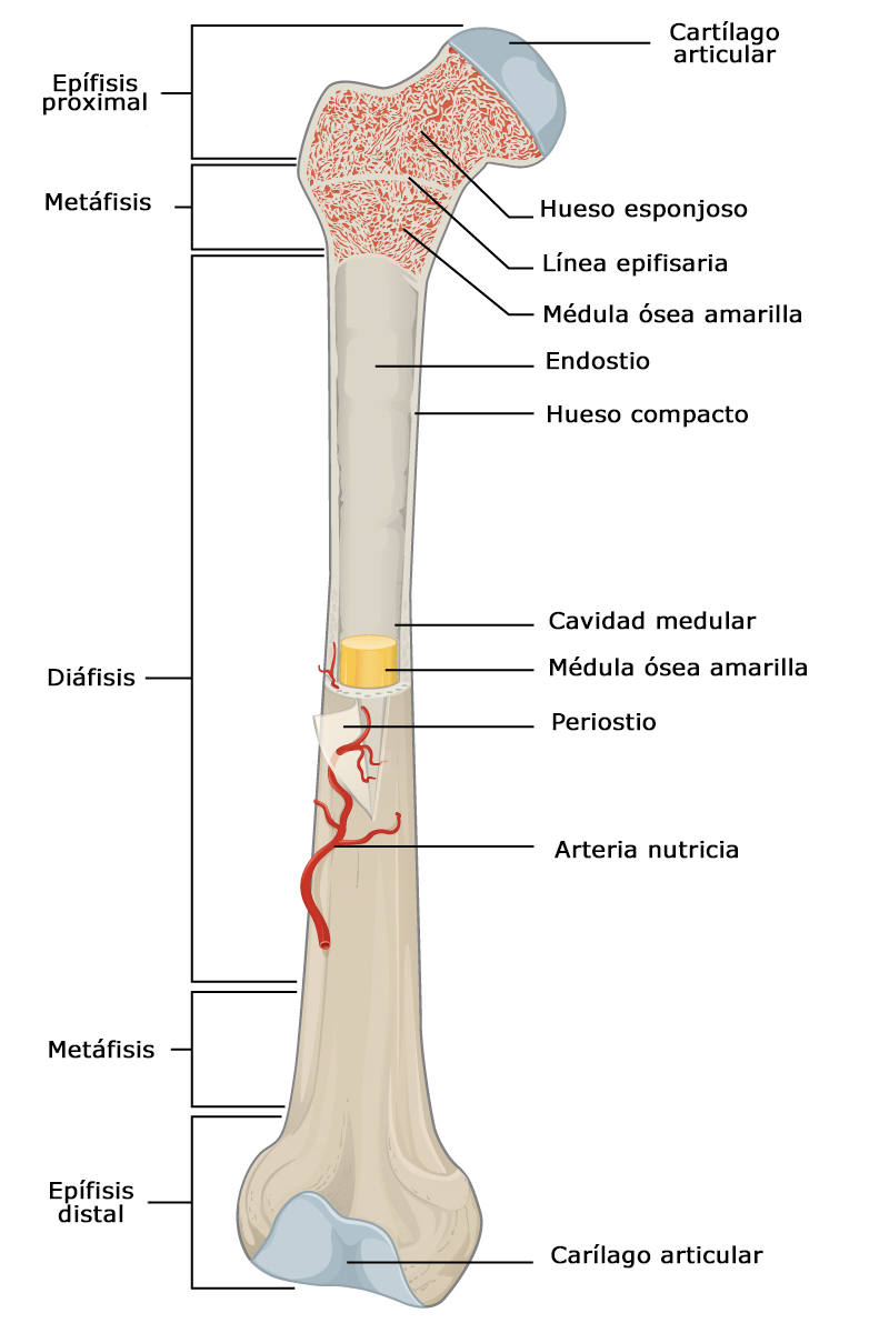 Esquema de un hueso largo con los rótulos en español